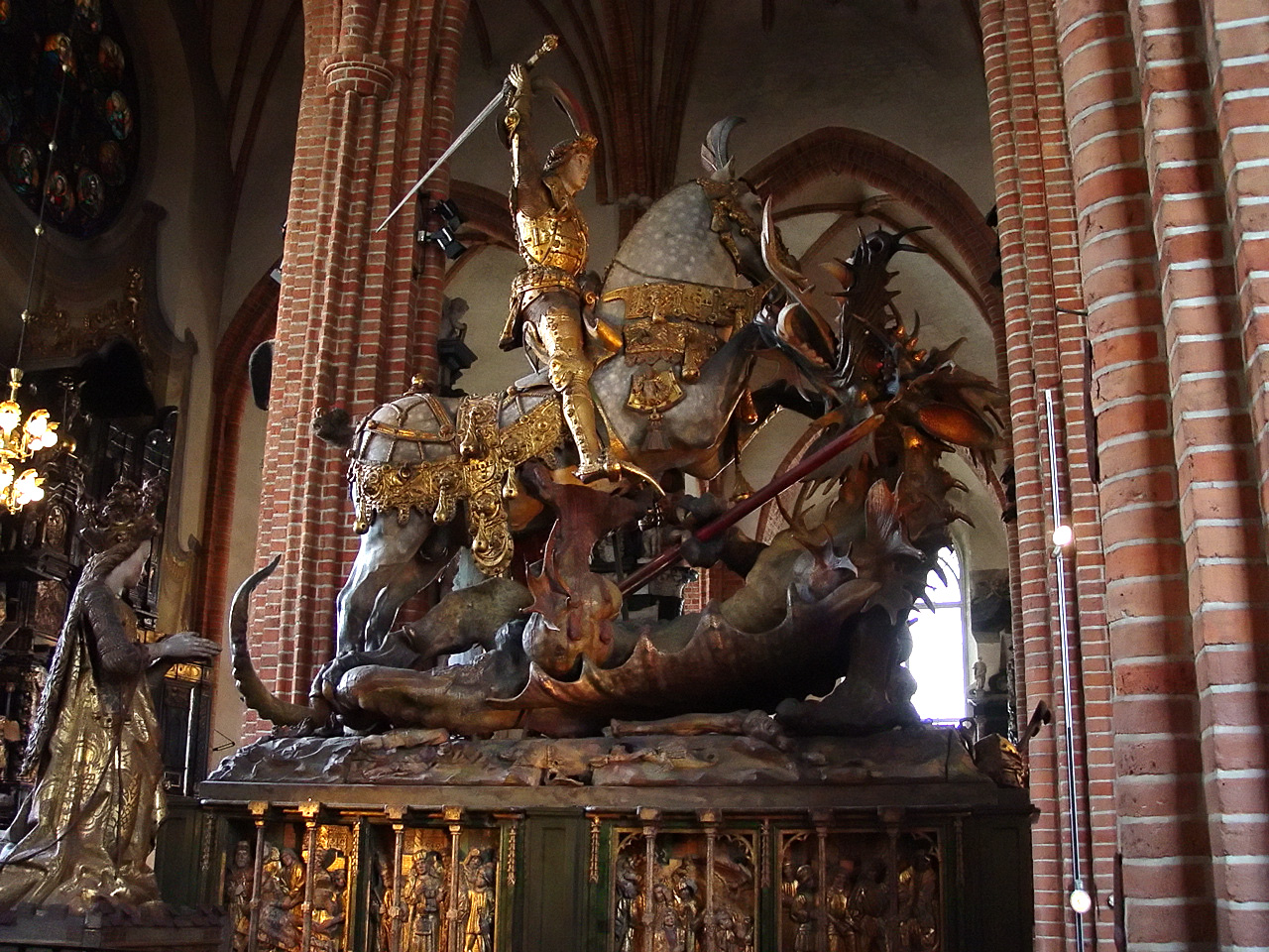 St.Georg und der Drache (Entwurf Bernt Notke) in Stockholm (Storkyrkan)